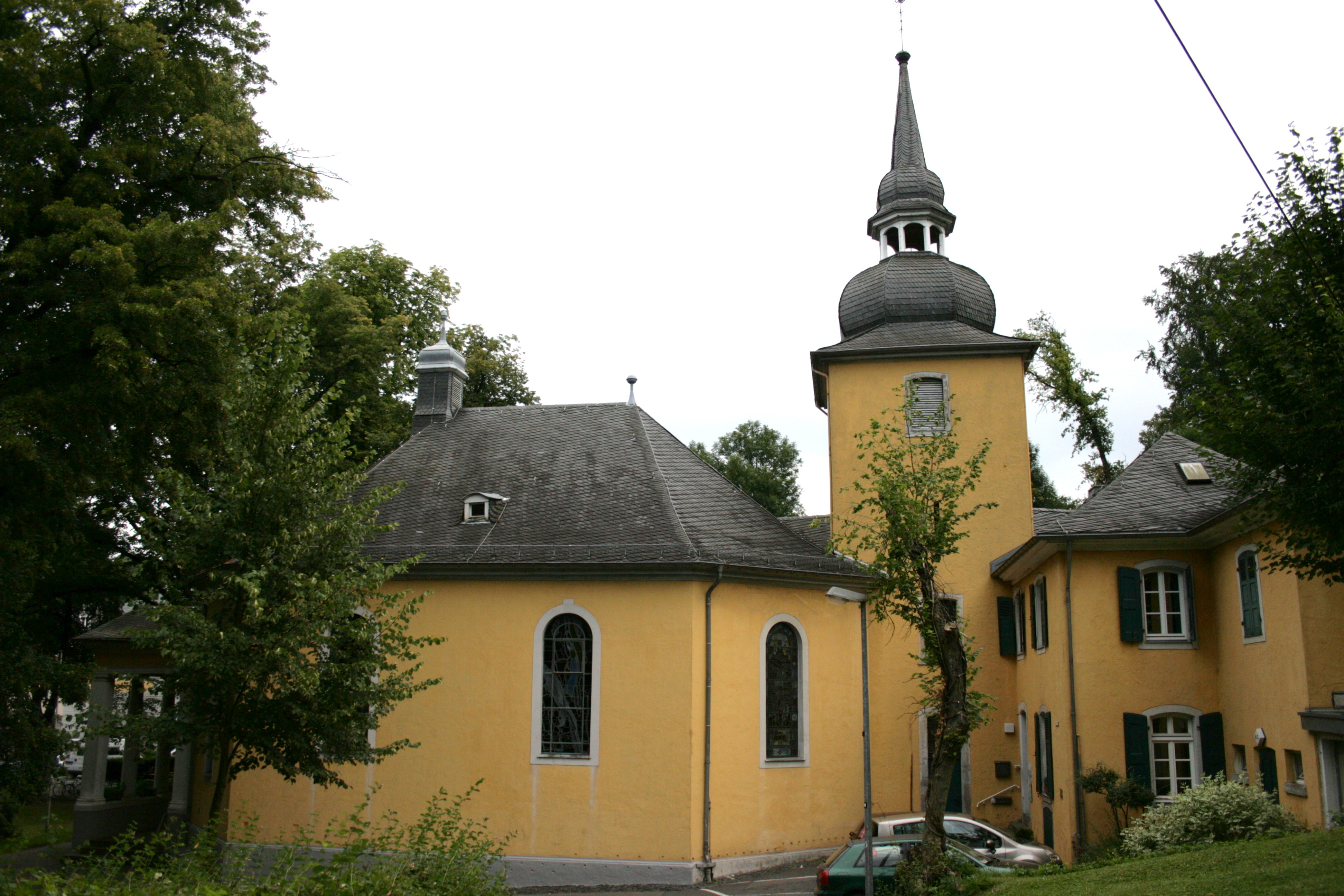 Evangelische Gnadenkirche, Hauptstraße 264 in Bergisch Gladbach